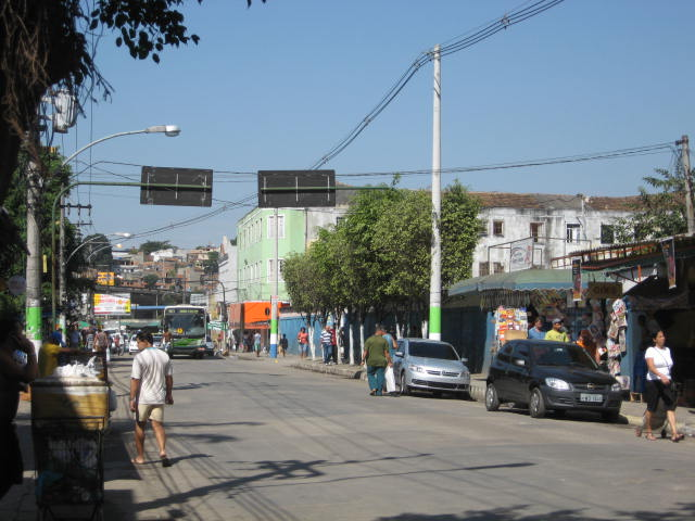 Avenida Automóvel Clube, localizada no centro de São João de Meriti, estado do Rio de Janeiro.